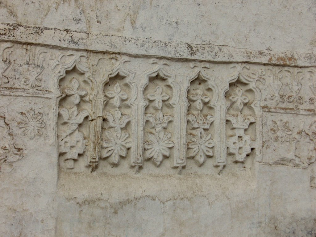 Zabid